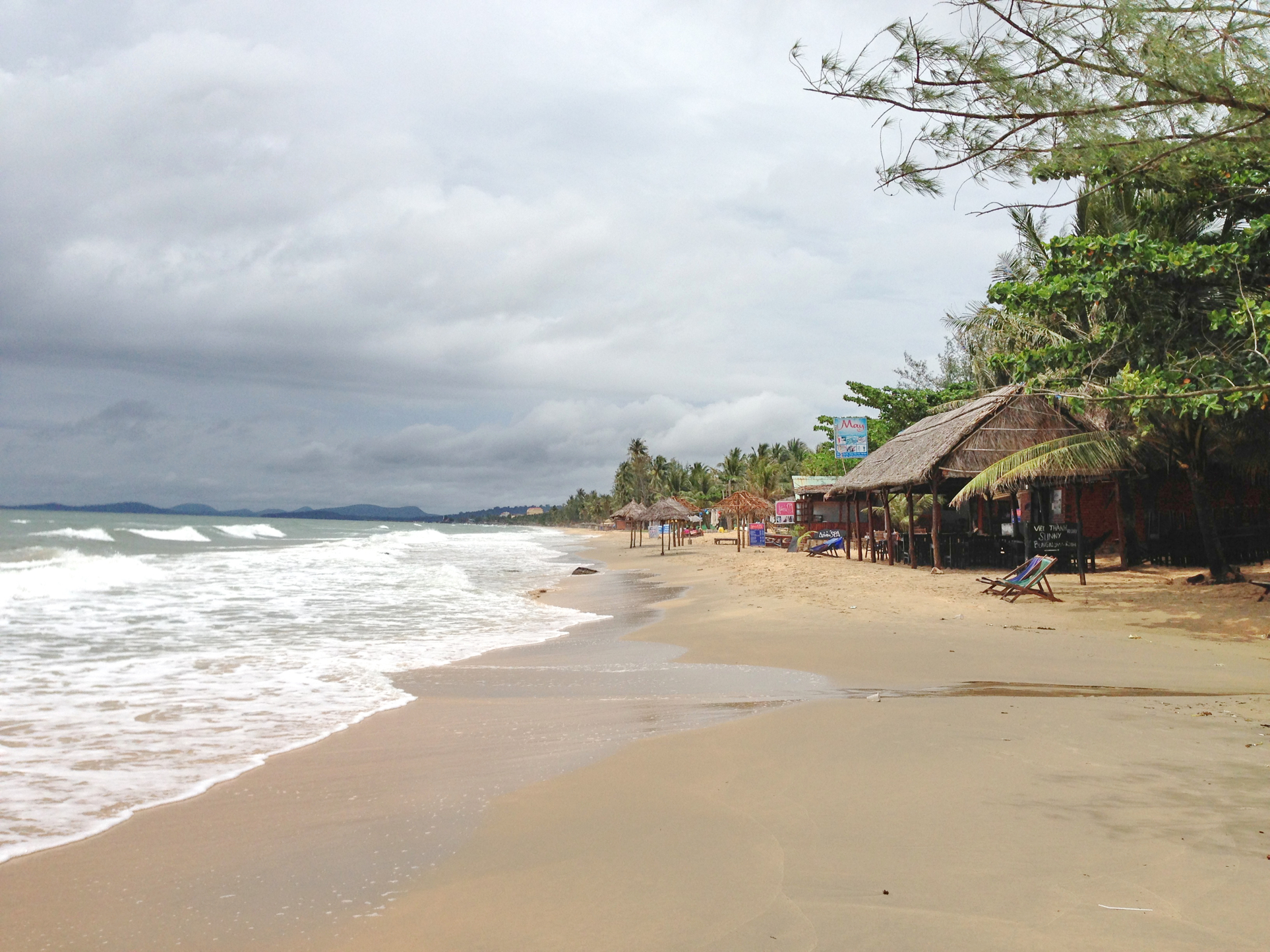 Bãi Biển Cửa lắp, Dương Tơ Phu quoc vietnam